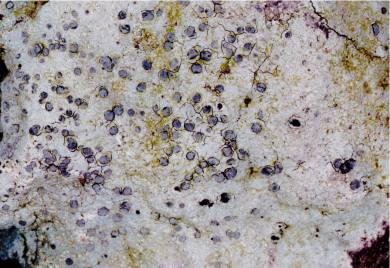 Porpidia albocaerulescens